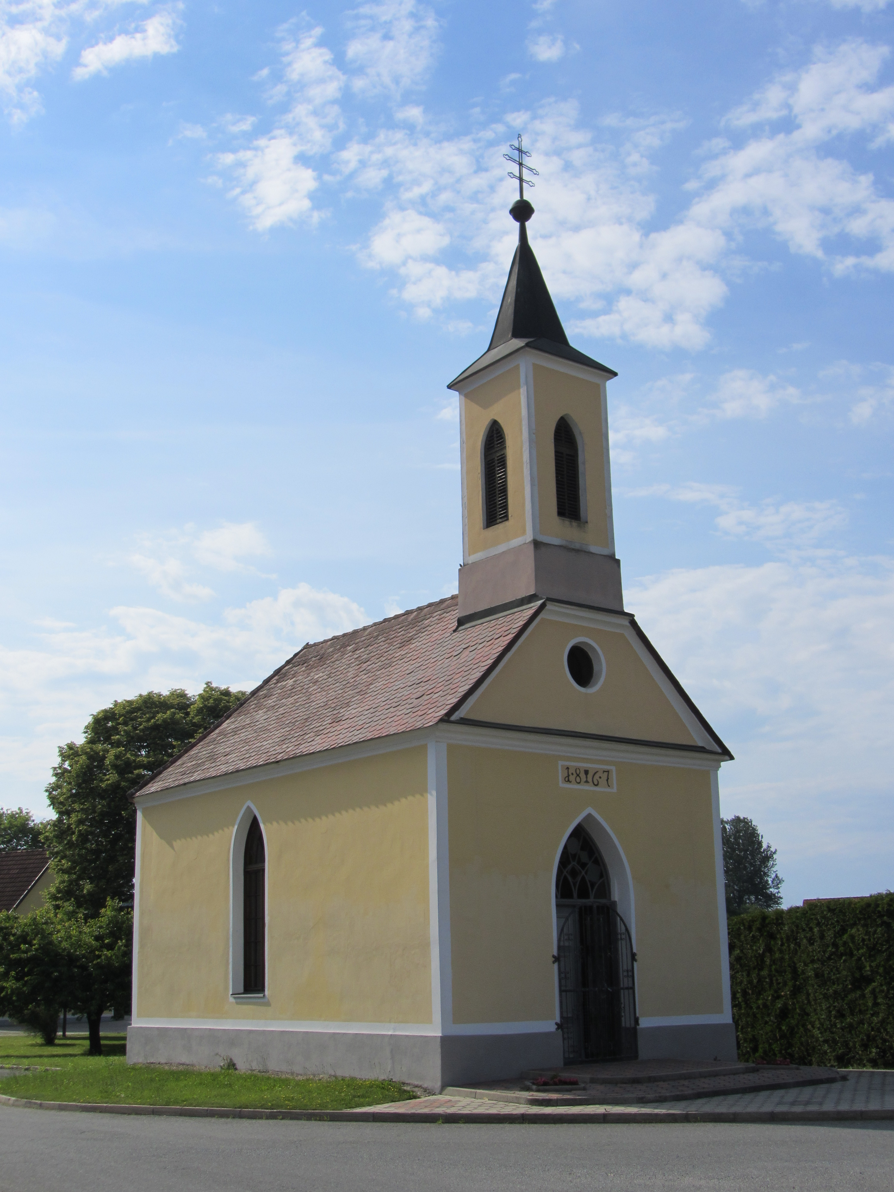 Ortskapelle